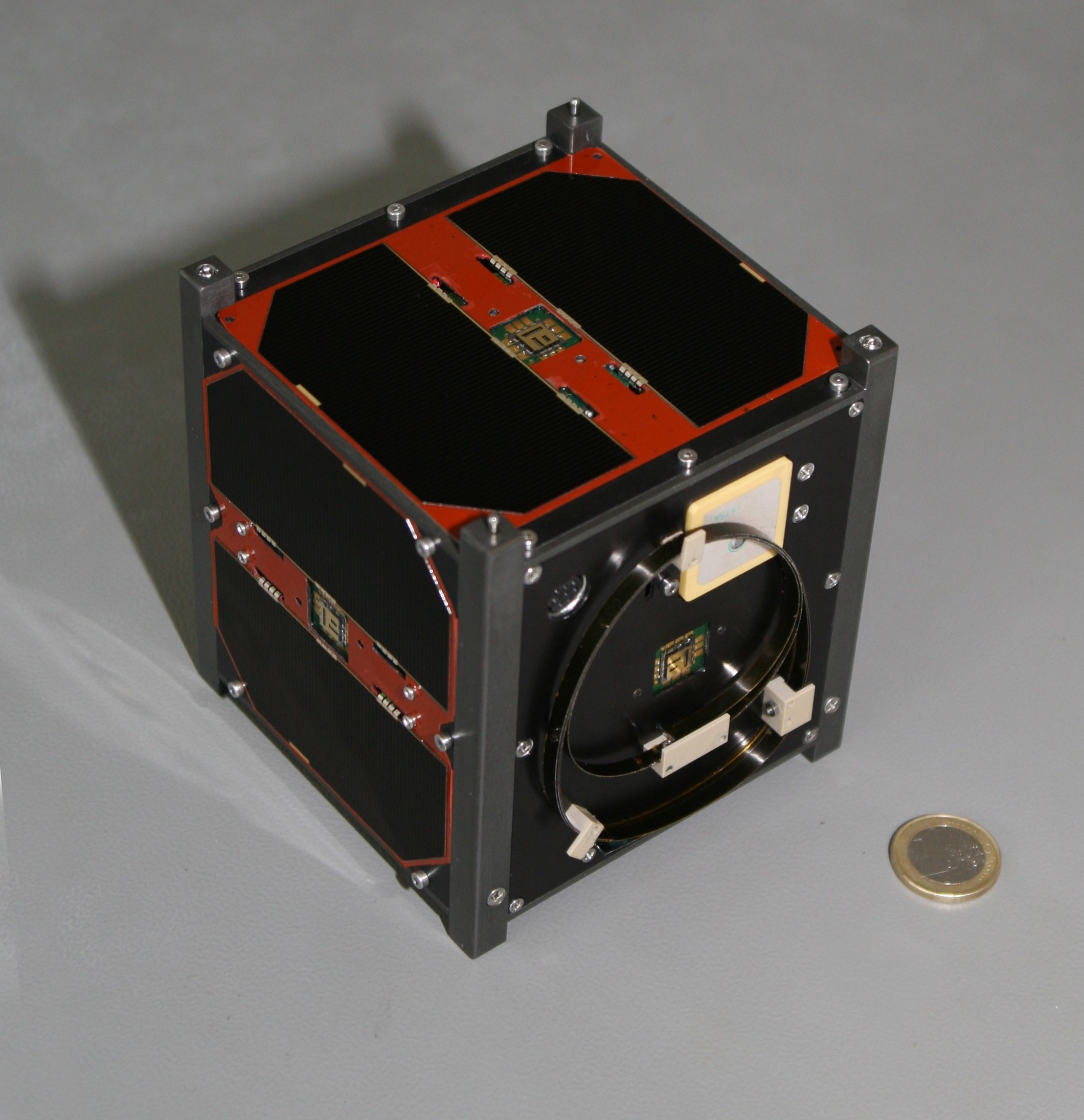 Compass-1